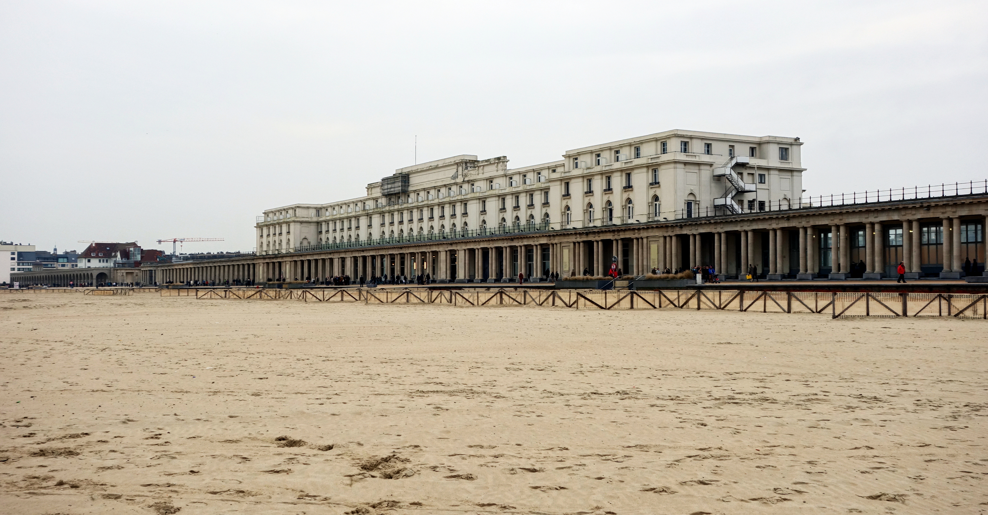 L'hôtel des thermes et les Galeries Royales d'Ostende.